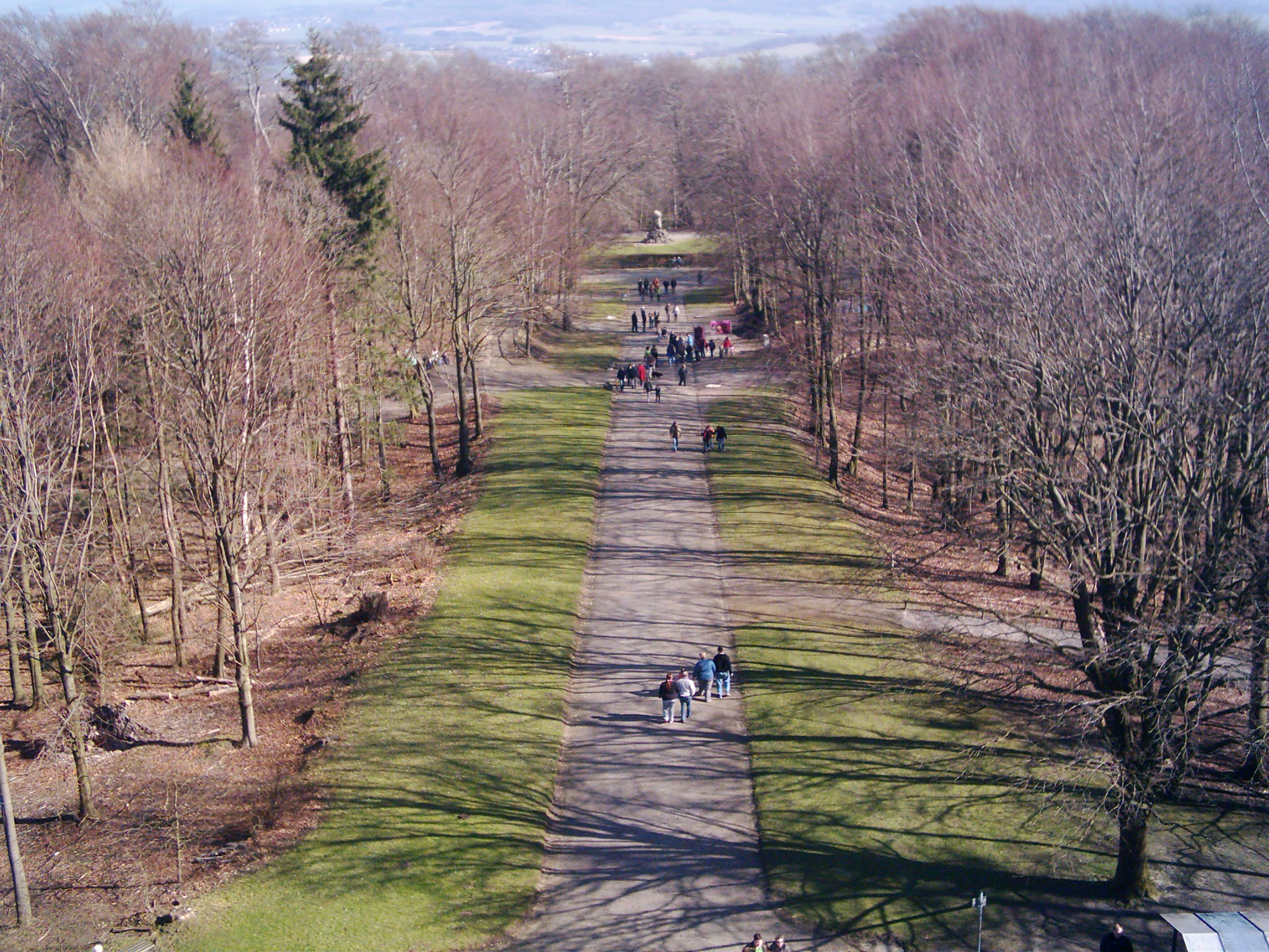 Blick vom Hermannsdenkmal, Detmold, in östlicher Richtung